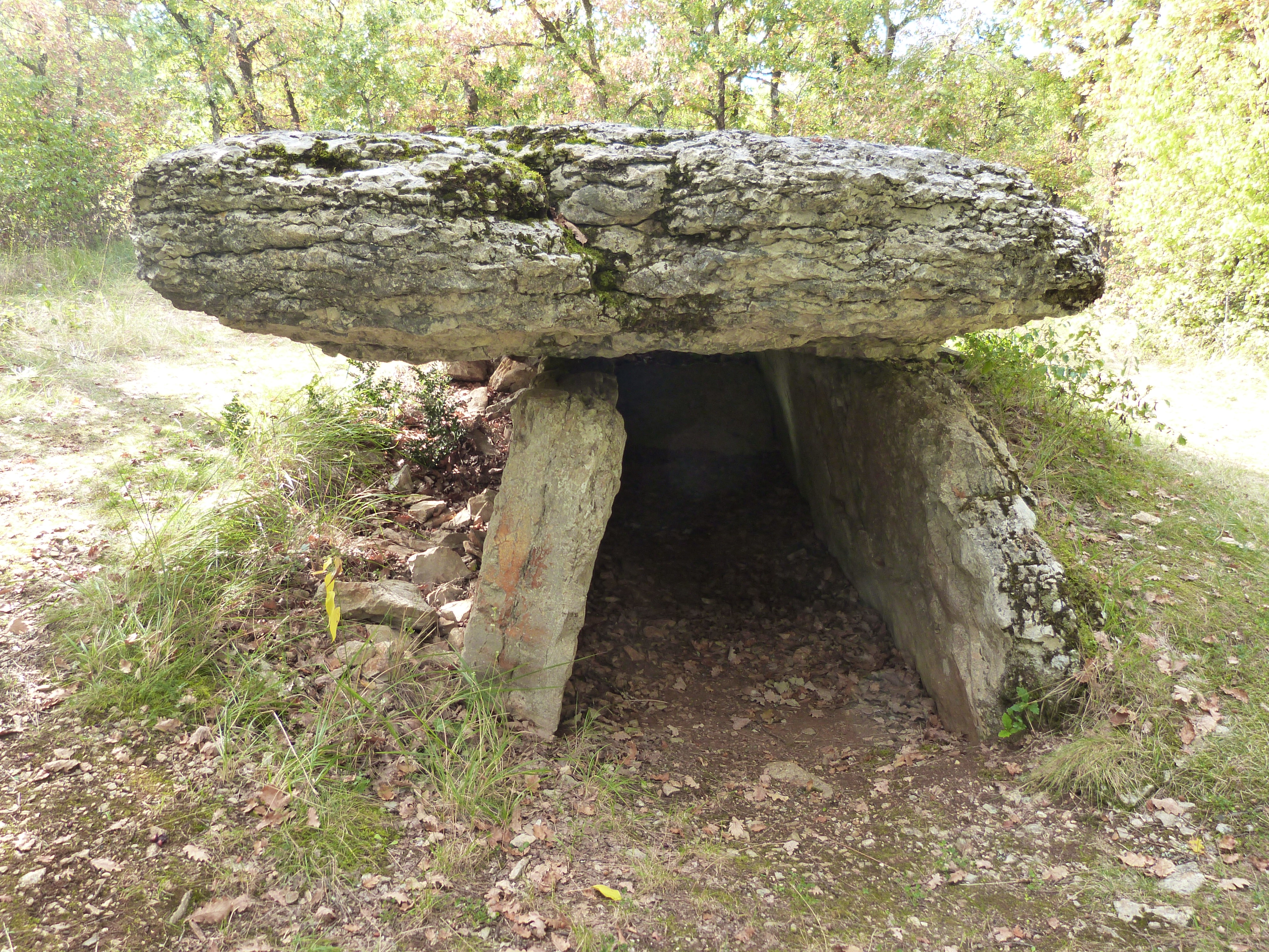 Dolmen de la Peyro Levado